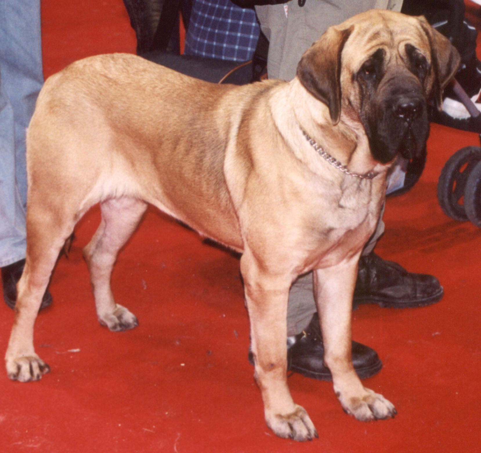 Mastif brazylijski na wystawie psów rasowy w Spodku - Katowicach